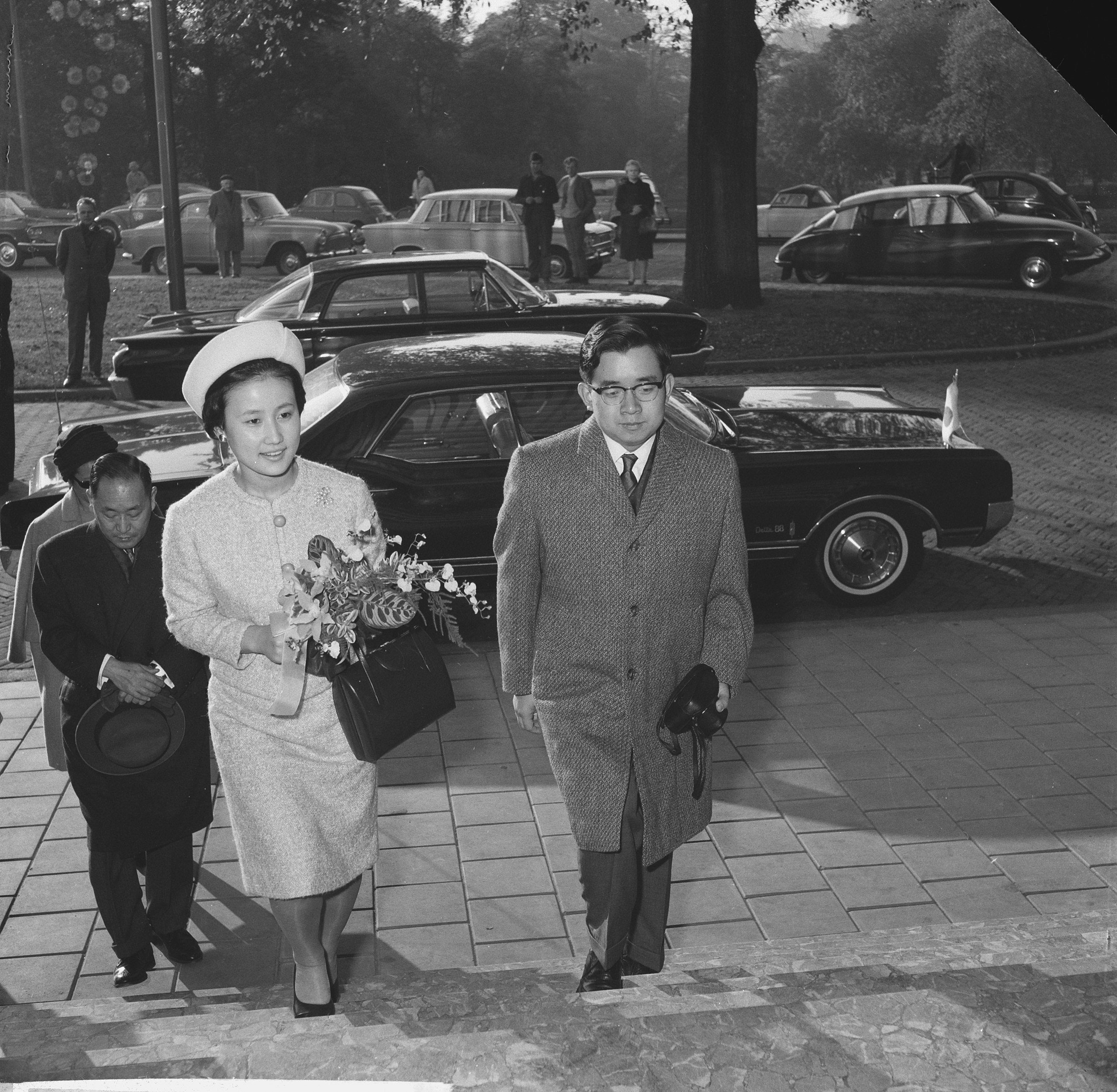 Collectie / Archief : Fotocollectie Anefo Reportage / Serie : Bezoek van prins Hitachi van Japan en zijn echtgenote prinses Hitachi (Hanako Tsugaru) aan de Japanse consul-generaal in Nederland Beschrijving : prinsen, koninklijke bezoeken, prinsessen, Hitachi, prins van Japan, Hitachi, prinses van Japan Datum : 26 oktober 1965 Locatie : Nederland Trefwoorden : koninklijke bezoeken, prinsen, prinsessen Persoonsnaam : Hitachi, prins van Japan, Hitachi, prinses van Japan Fotograaf : Voets, Jan / Anefo Auteursrechthebbende : Nationaal Archief Materiaalsoort : Negatief (zwart/wit) Nummer archiefinventaris : bekijk toegang 2.24.01.03 Bestanddeelnummer : 918-4051